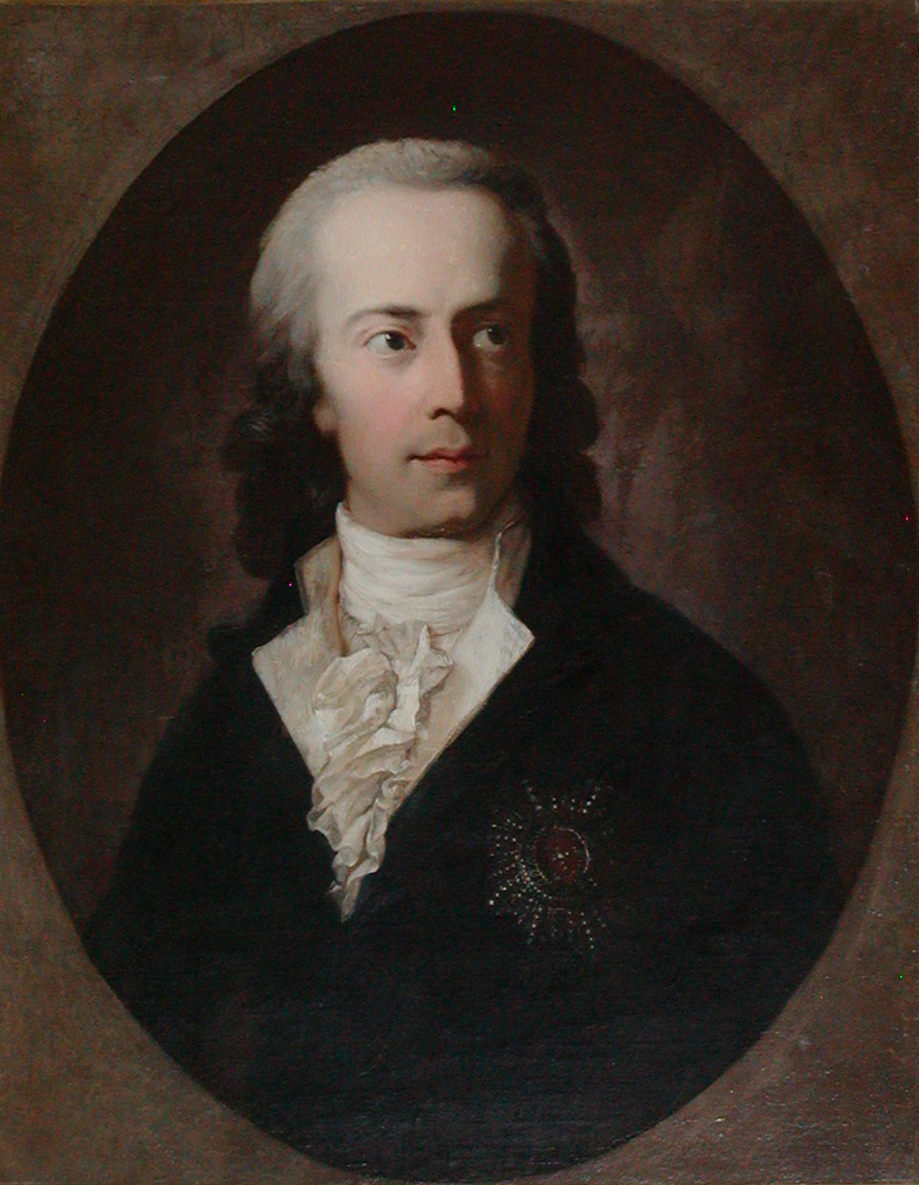 Hertug Frederik Christian II (1765-1814)